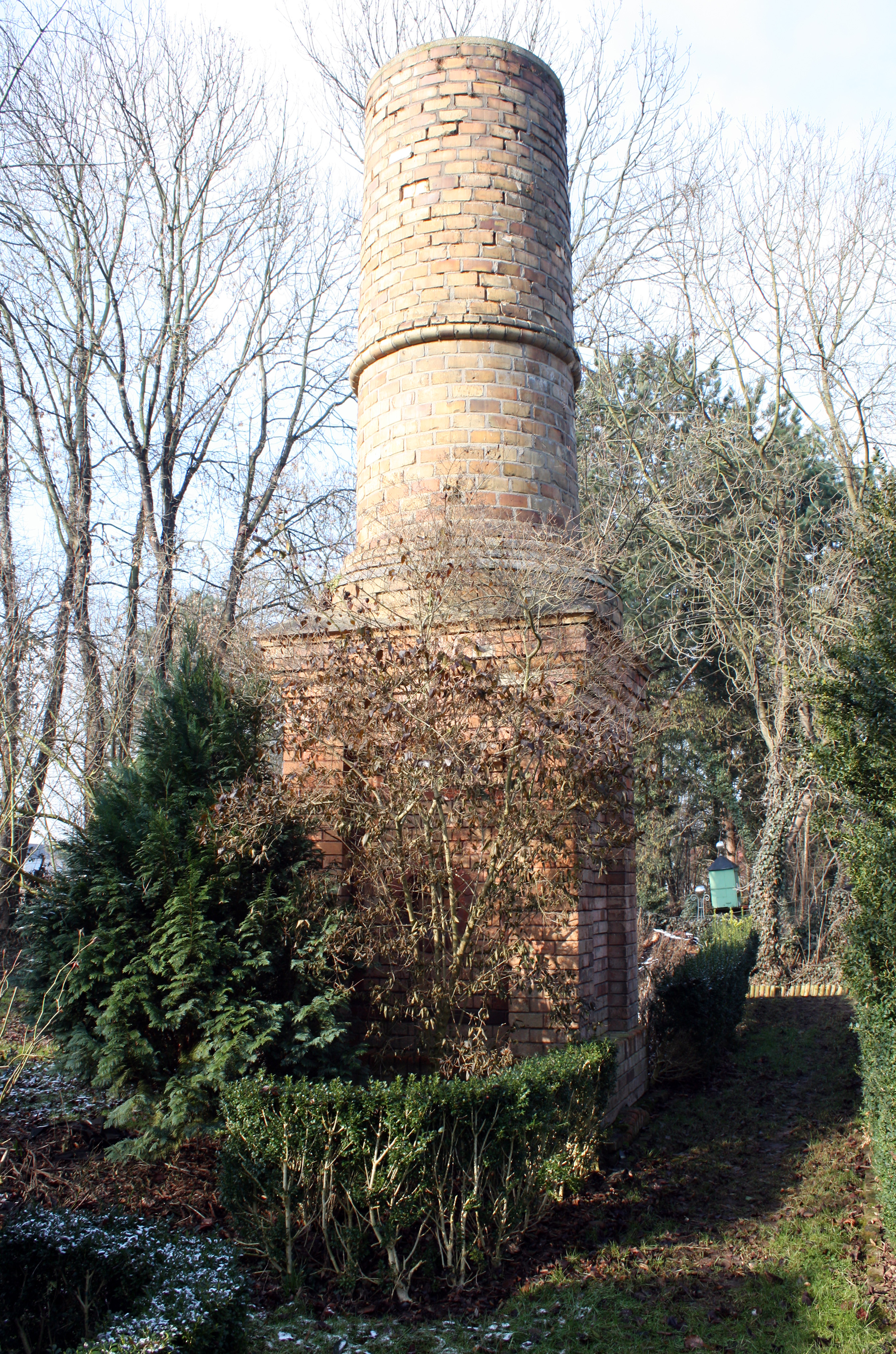 Lechenich-Oebelsmühle, Restschlot des Maschinenhauses, Detail